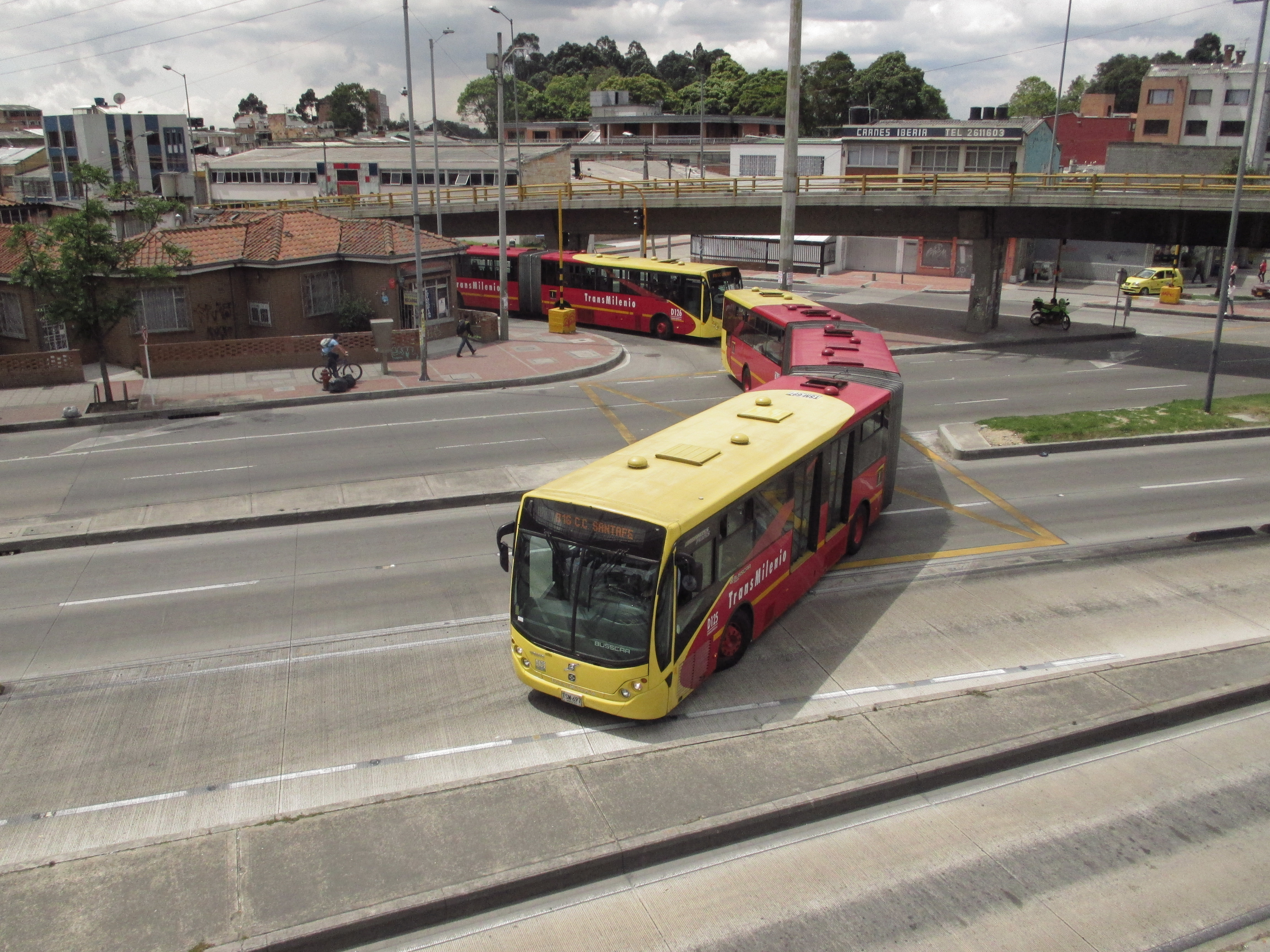 Bus TransMileni dando la curva Avenida 30